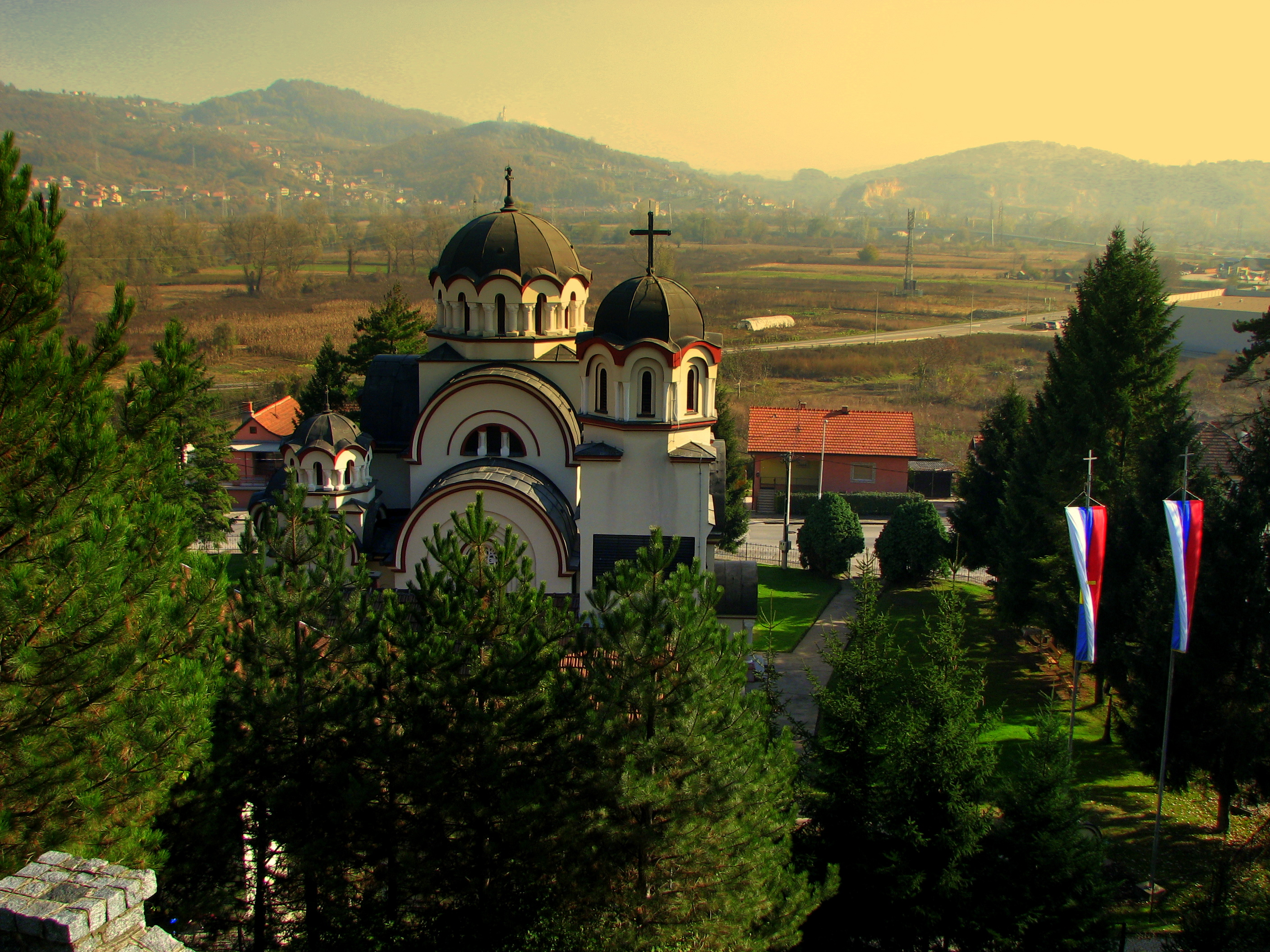 Црква Светих апостола Петра и Павла - Добој. Аутор: Бранко Д. Тодоровић